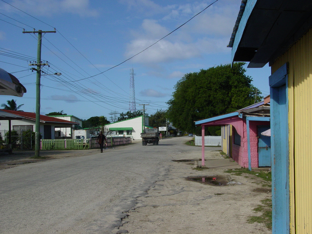 Downtown Pangai, Lifuka, Ha'apai, Tonga